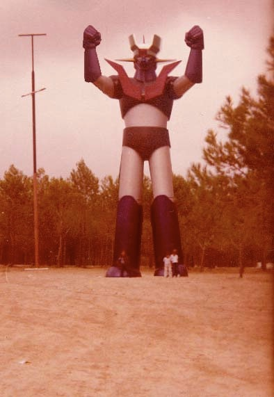 Ig-maz2